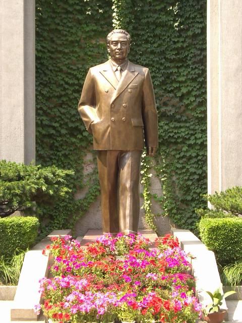 梅園新村紀念館 周恩来像 2004年5月22日撮影 撮影者:権作